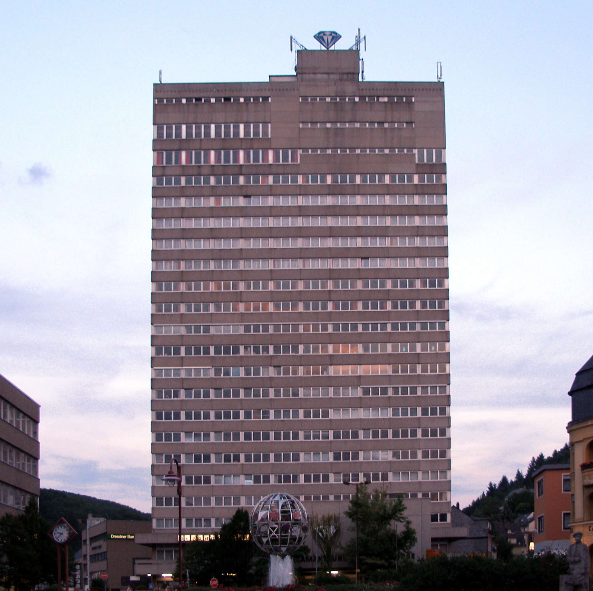 Die Deutsche Diamant- und Edelsteinbörse in Idar-Oberstein. Blick über den Schleiferplatz.